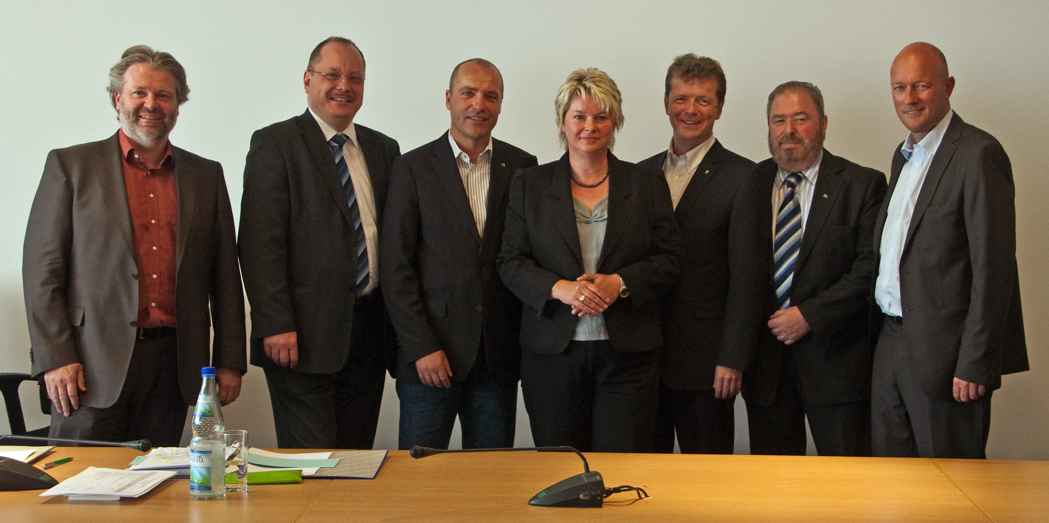 FDP-Landtagsfraktion in Thüringen